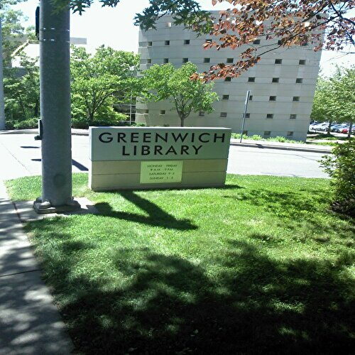 アメリカコネチカット州グリニッジ図書館。